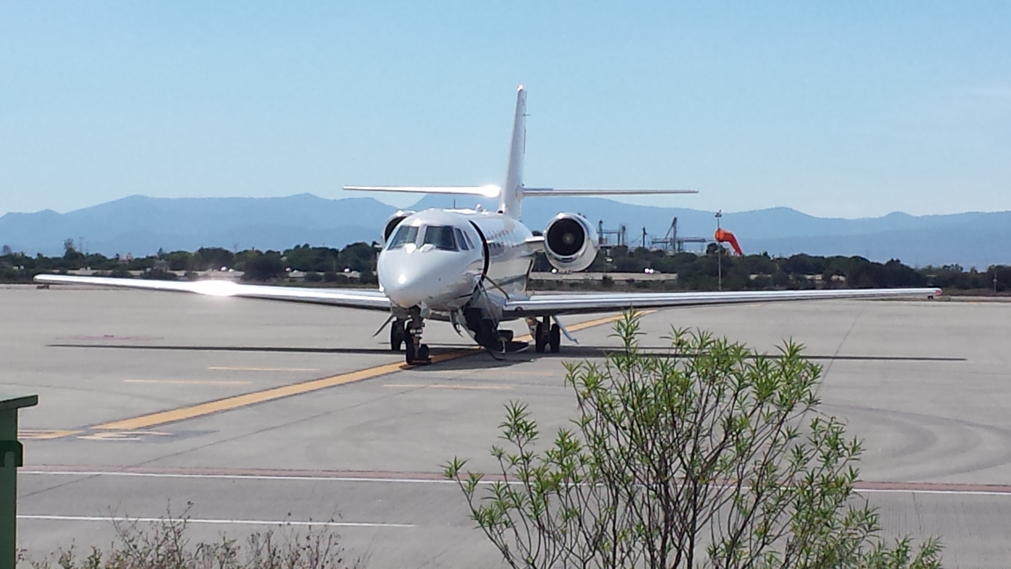 Fotografía de un avión típico en el Aeropuerto Intercontinental de Querétaro